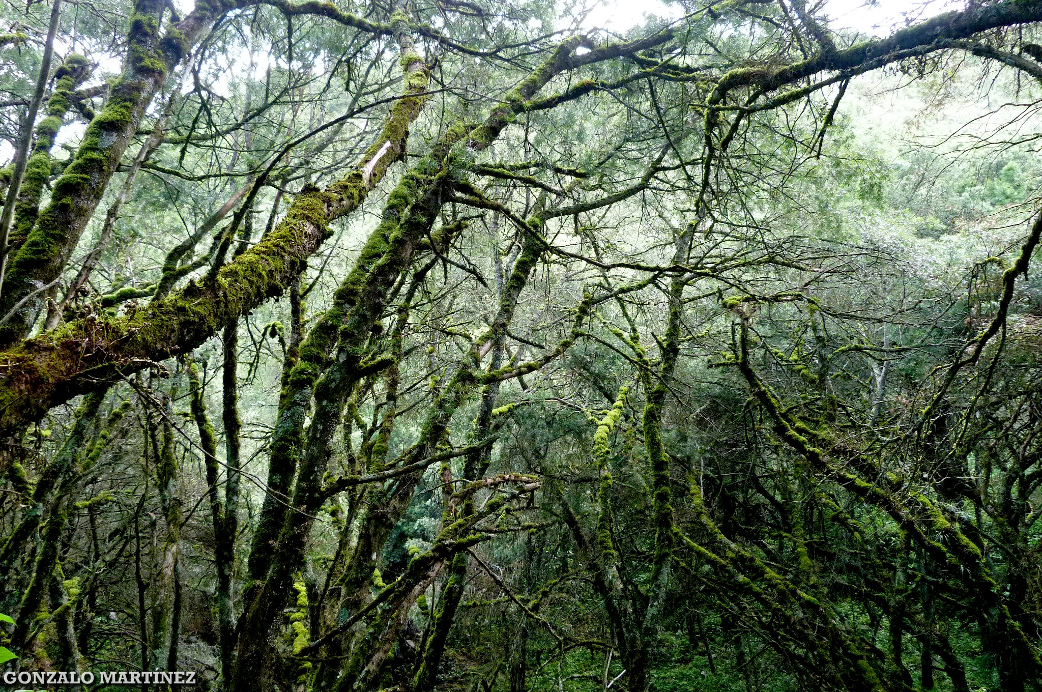 Bosque de Podocarpus parlatorei en la provincia de Catamarca, Argentina. Foto: Gonzalo Martínez